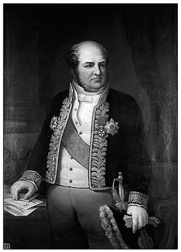 Arpetan: Jean Pierre Joseph Lacave-Laplagne est un magistrat à la Cour des comptes et homme politique français né à Montesquiou (Gers) le 12 août 1795 et mort à Paris le 14 mai 1849.